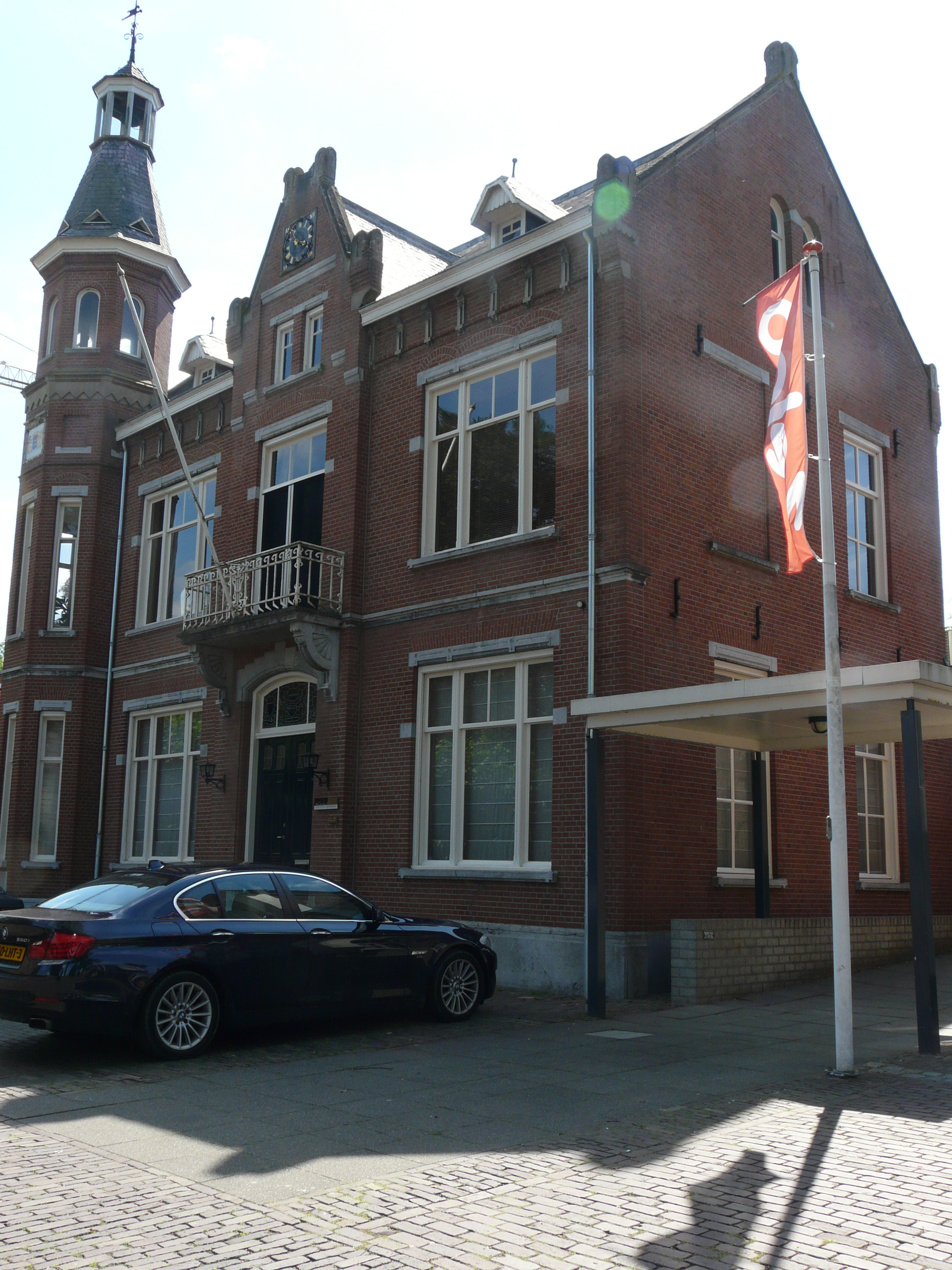 Hoofdstraat 8 in 's Gravenmoer